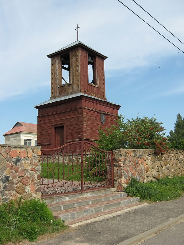 Граўжышкі. Тэрыторыя, дзе размяшчаўся Георгіеўскі касцёл